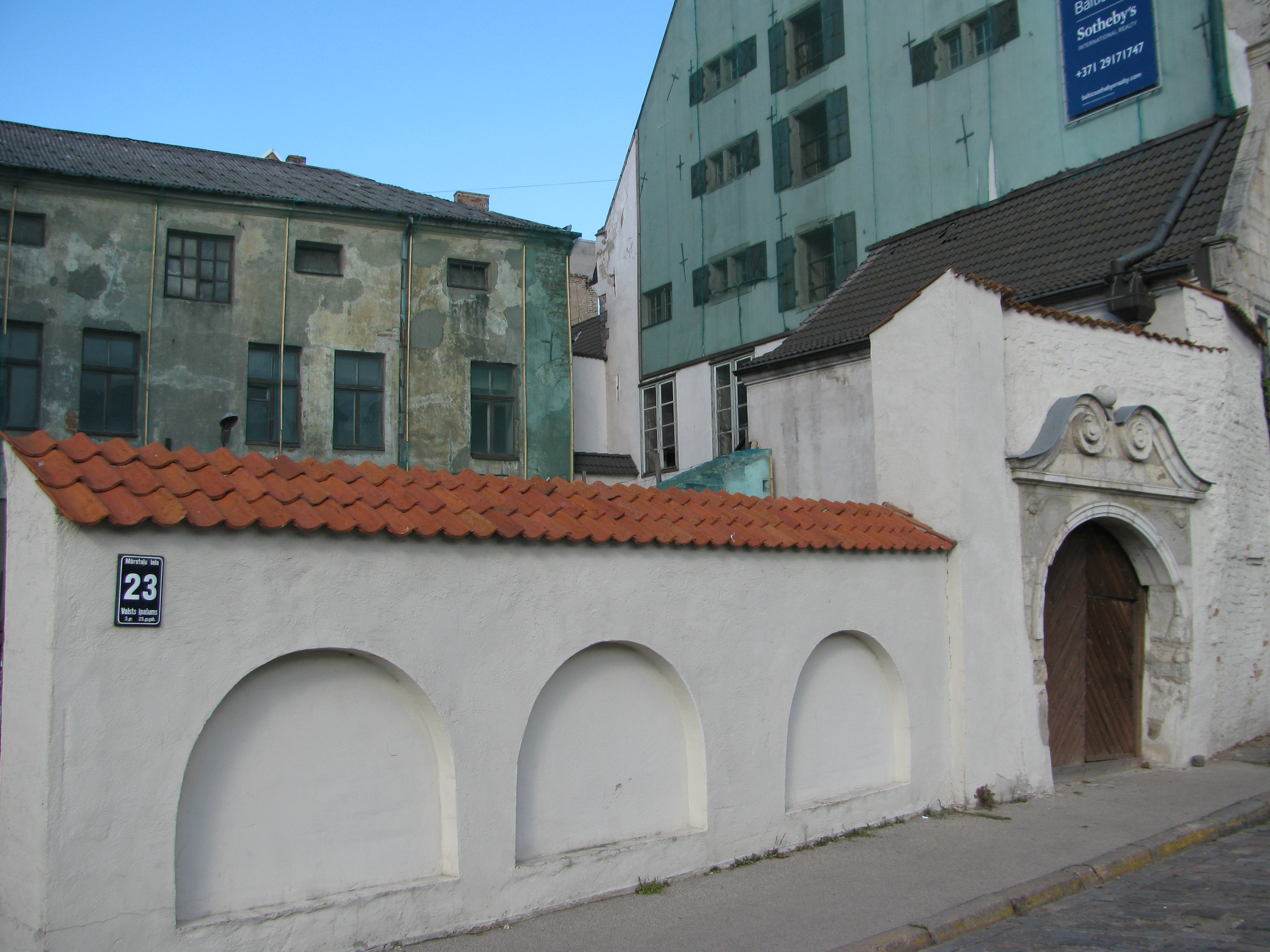 Dzīvojamo ēku komplekss, t.sk. Dannenšterna nams, Rīga, Mārstaļu iela 19; Mārstaļu iela 21; Mārstaļu iela 26; Mārstaļu iela 23